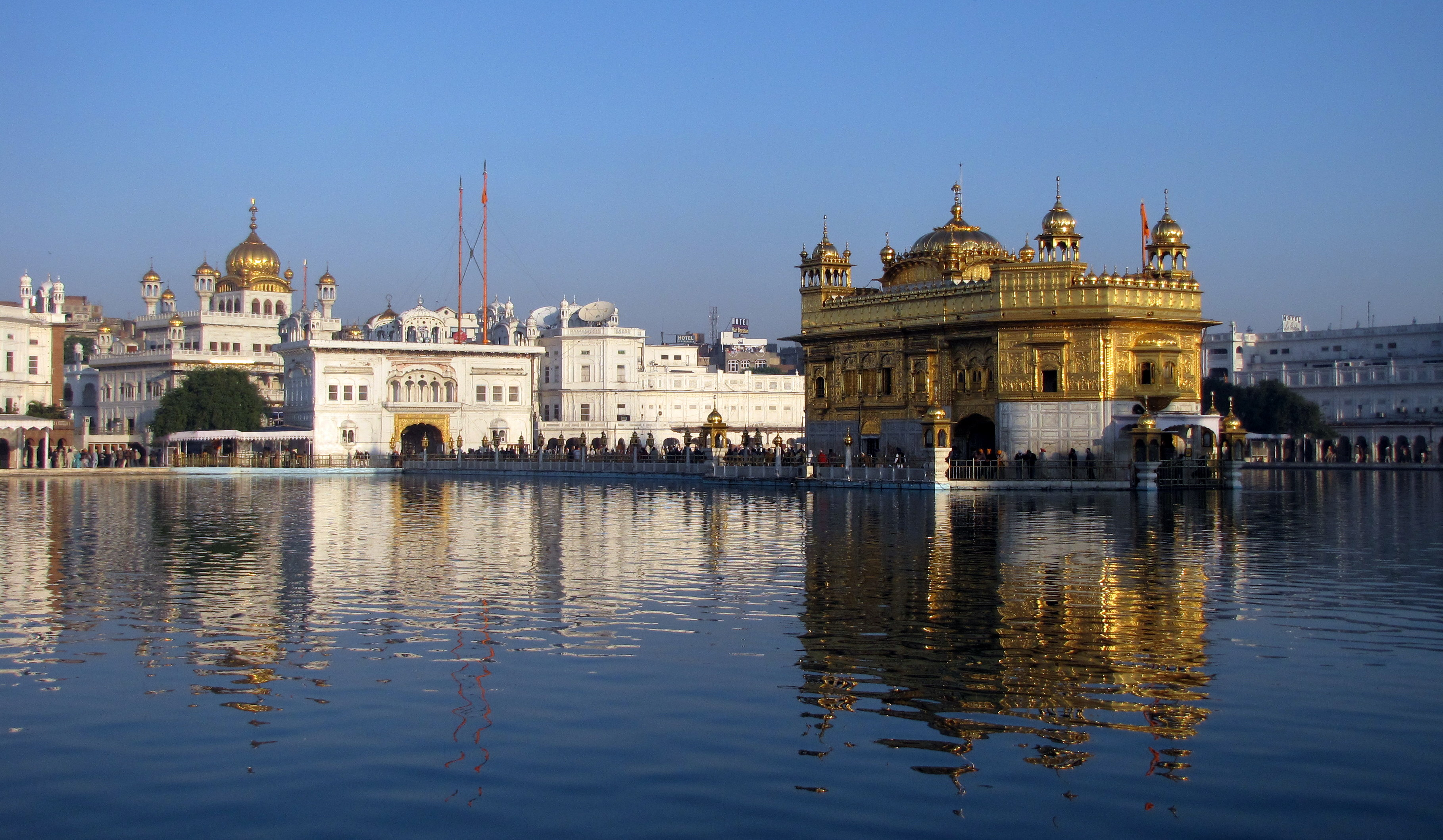 darbar sahib and akal takht